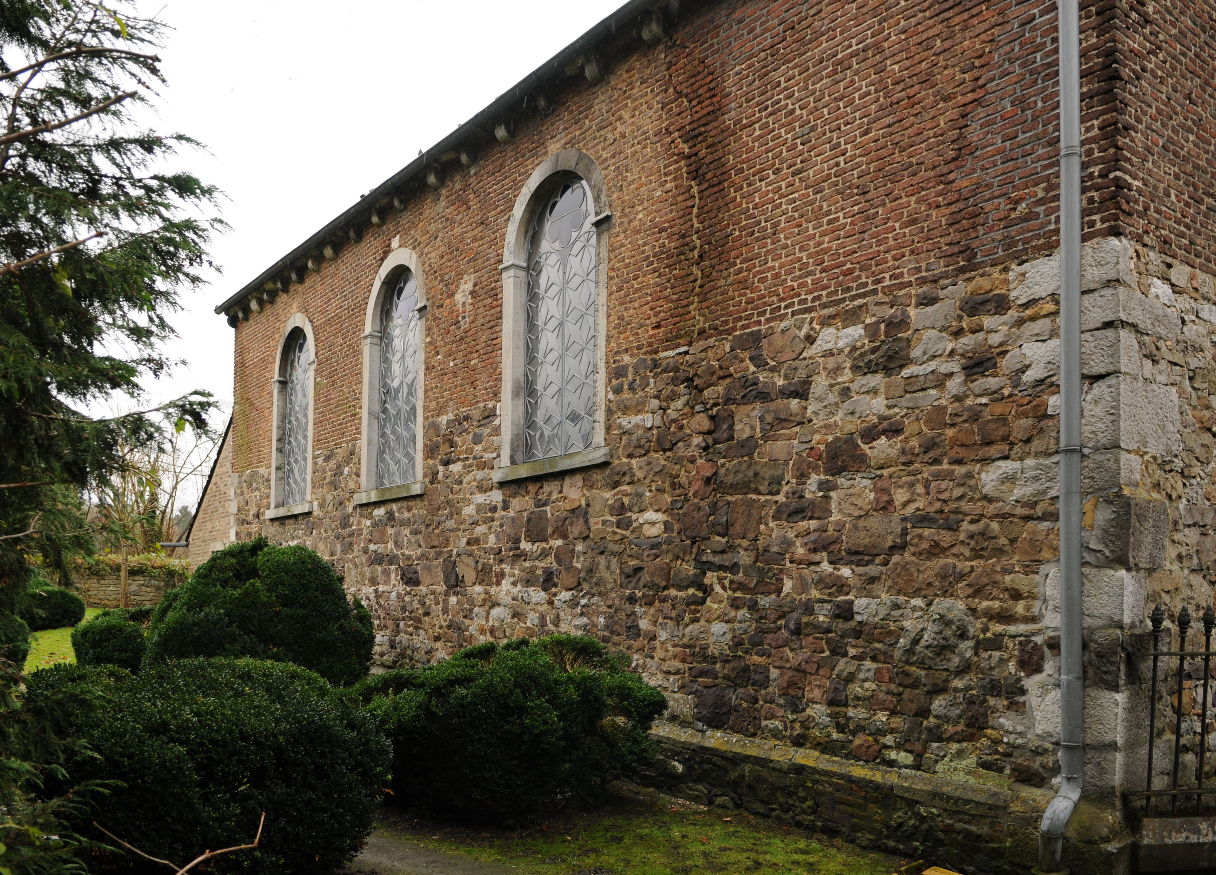 Vue extérieure